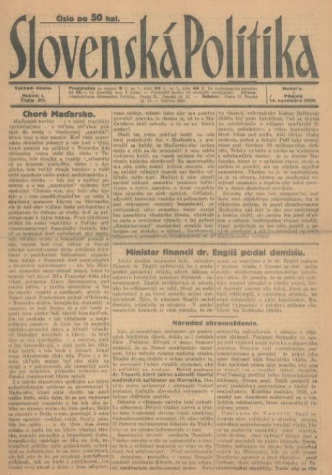 Titulný list periodika Slovenská politika, ktoré vychádzalo na Slovensku od r. 1920.